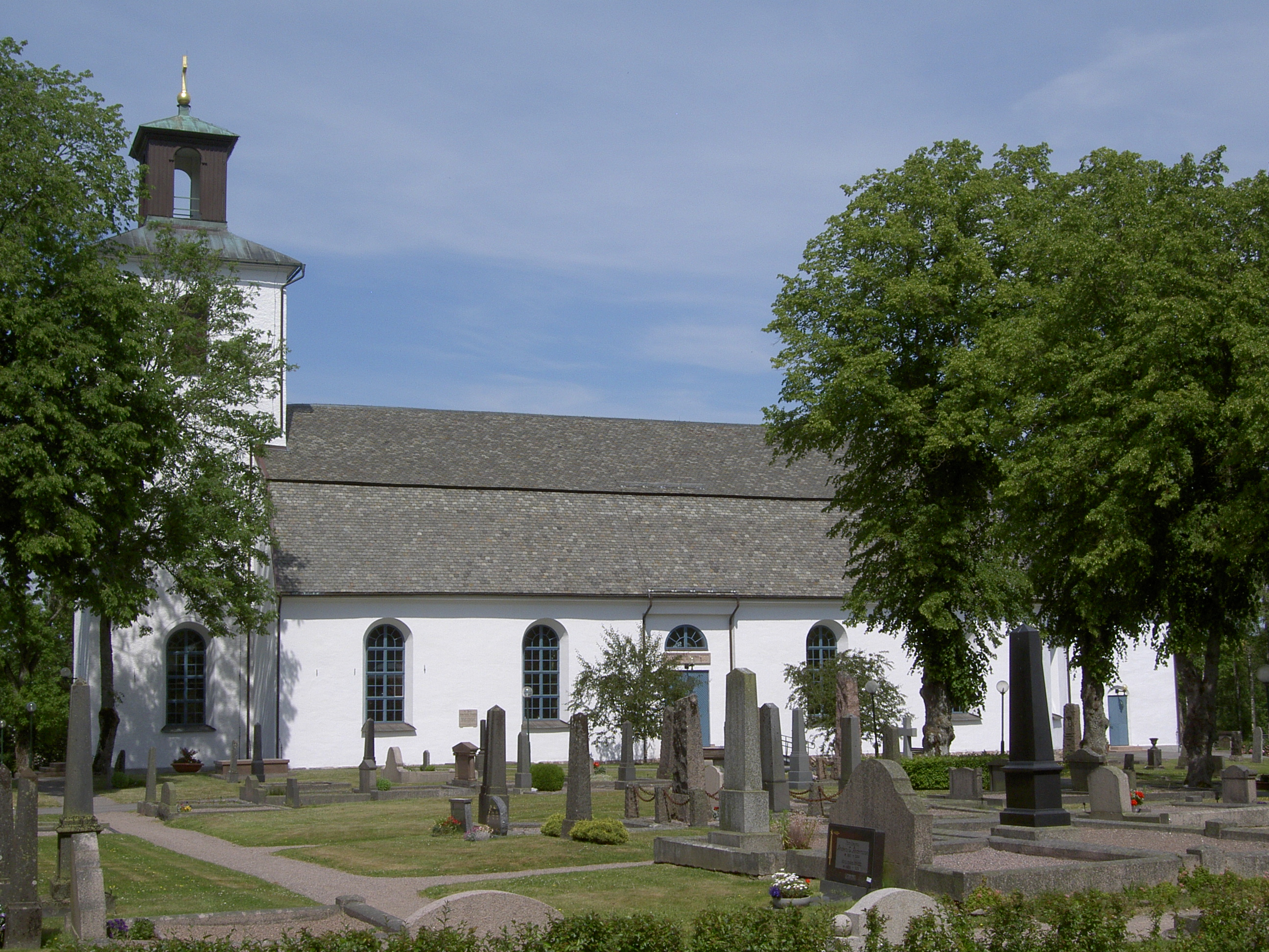 Frändefors kyrka